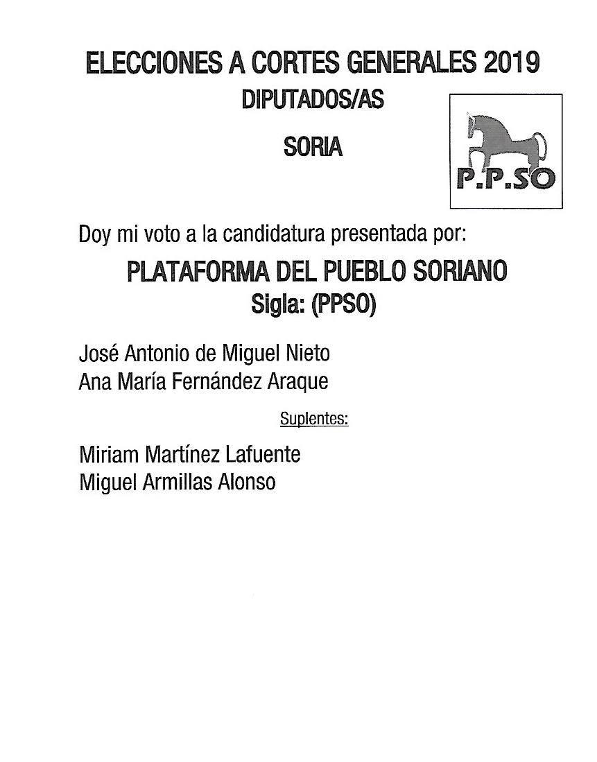 Papeleta electoral de Plataforma del Pueblo Soriano (PPSO) para el Congreso - Elecciones Generales de España de noviembre de 2019, circunscripción de Soria.